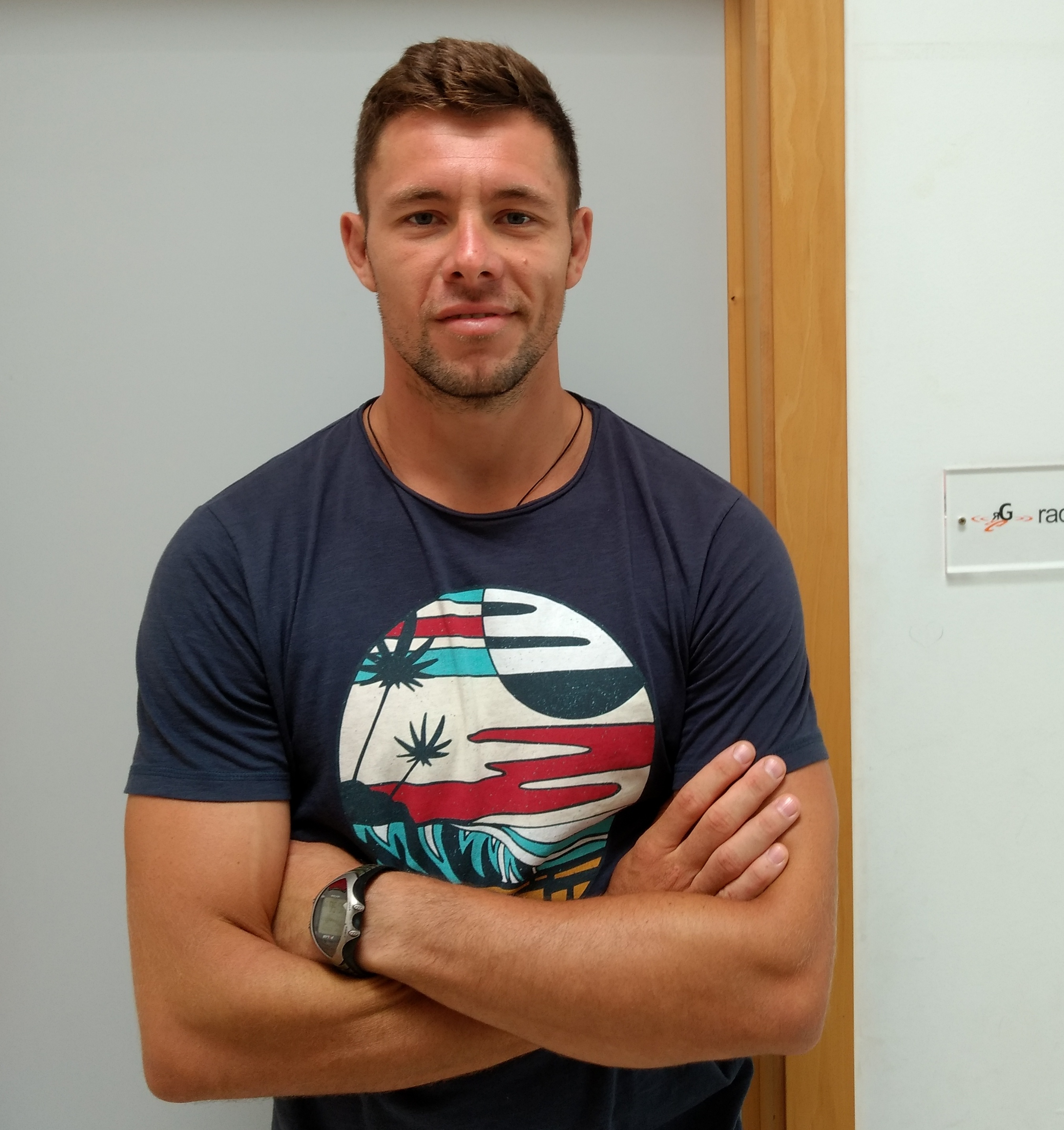 L'esportista olímpic Matías Tudela